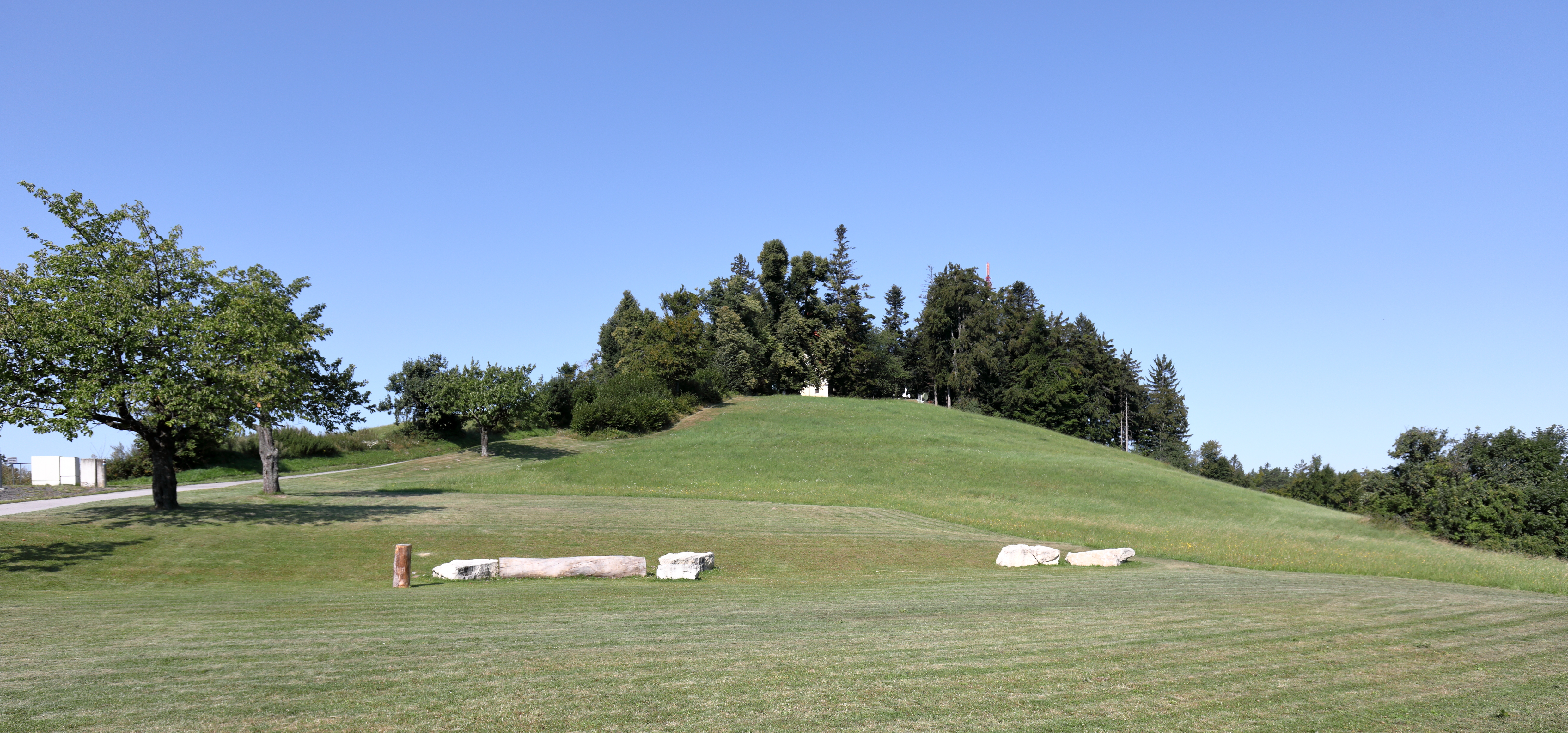 Der Gipfel des 748 m hohen Heubergs, auch als Rosalia bezeichnet, in Neustift an der Rosalia, ein Ortsteil der burgenländischen Gemeinde Forchtenstein.Direkt auf dem Gipfel steht die 1670 errichtete Rosalienkapelle. Rund 150 m nordwestlich der Kapelle befindet sich der 1981 gebaute Sender Heuberg und unmittelbar östlich der Kapelle wurde ein Trinkwasser-Speicherbehälter errichtet sowie Richtfunkantennen.